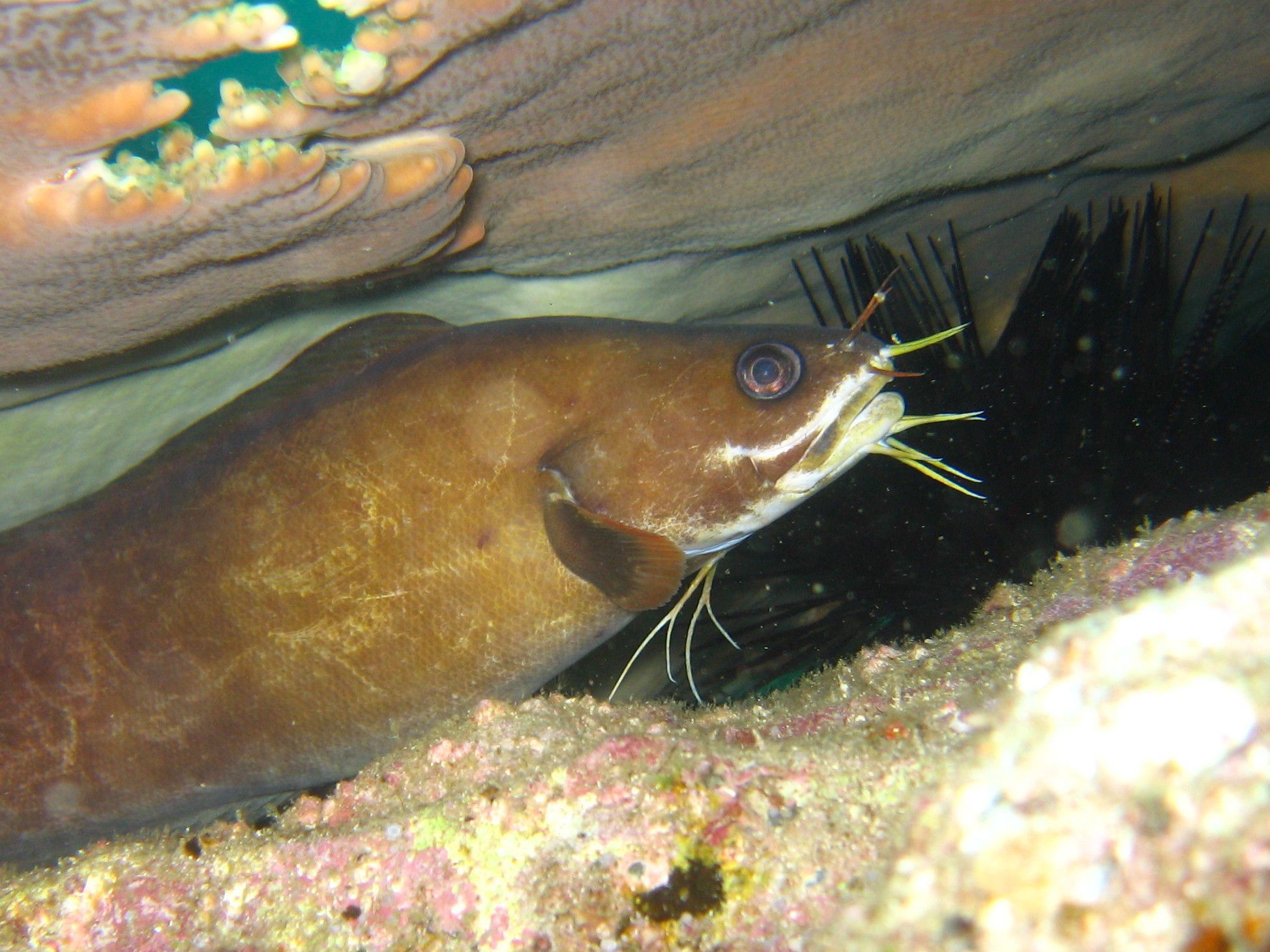 Brotula multibarbata, in Kashiwajima Kohchi-ken(Prefecture), Japan